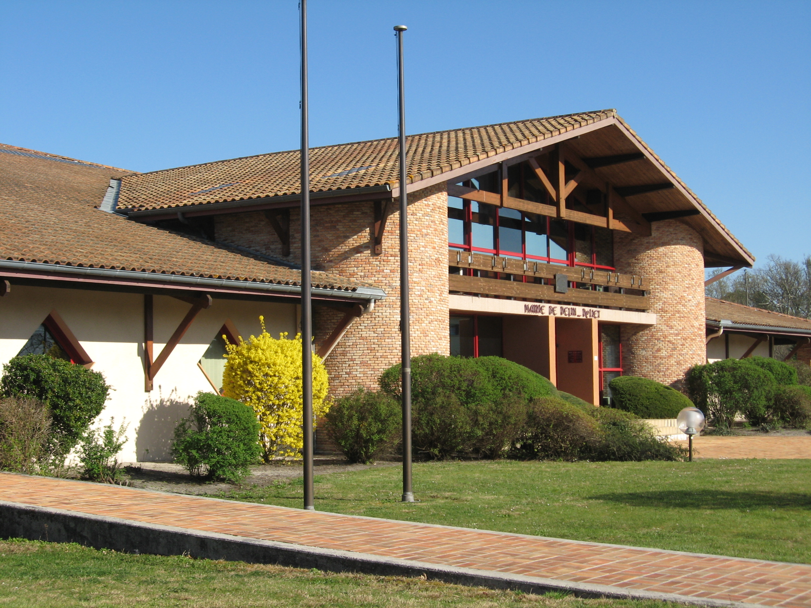 Mairie de Belin-Beliet